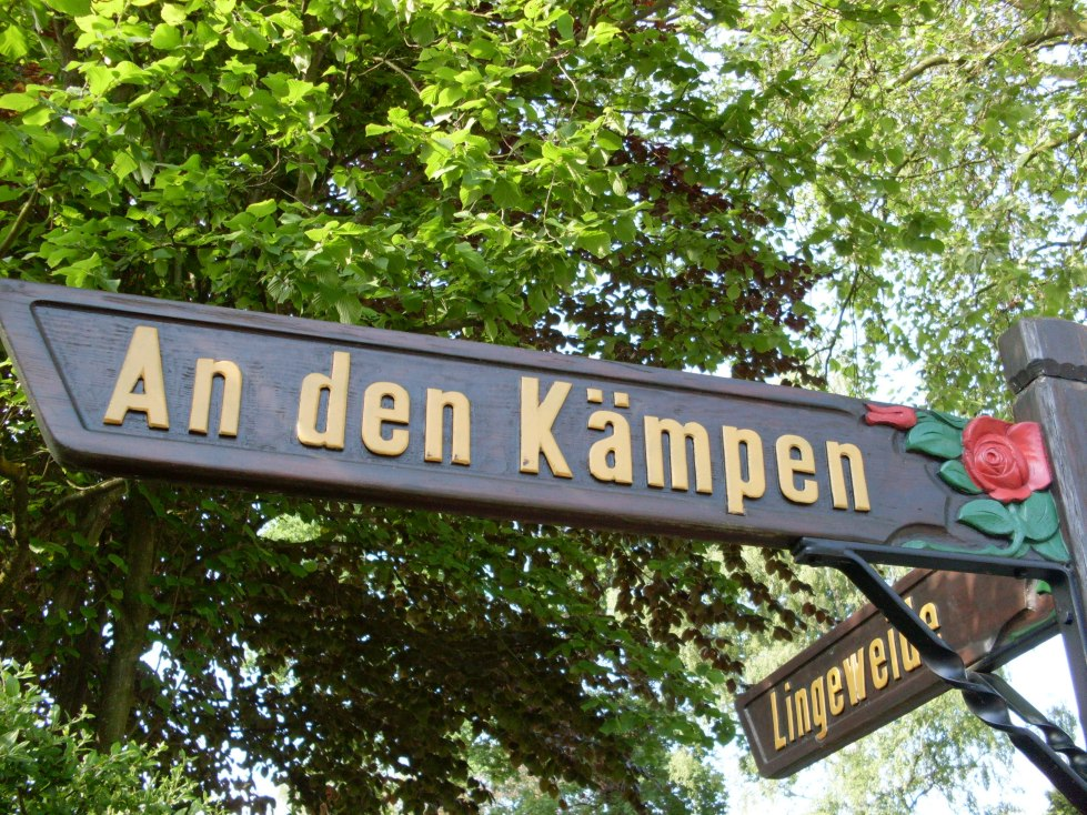 Geschnitztes Straßenschild in der "Rosenstadt Angermund", seit 1975 ein Stadtteil von Düsseldorf